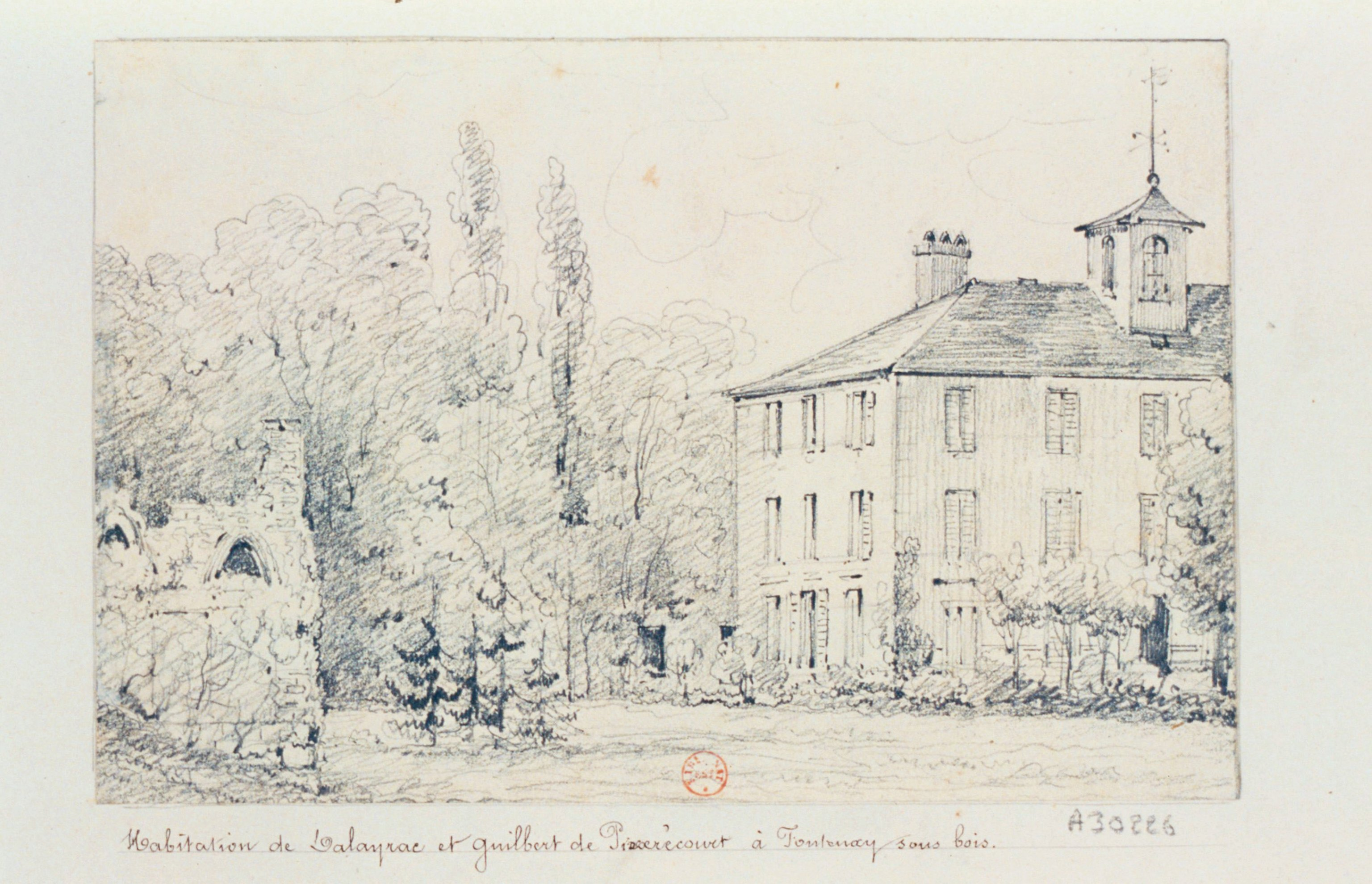 Habitation de Dalayrac et Guilbert de Pixerécourt à Fontenay-sous-Bois